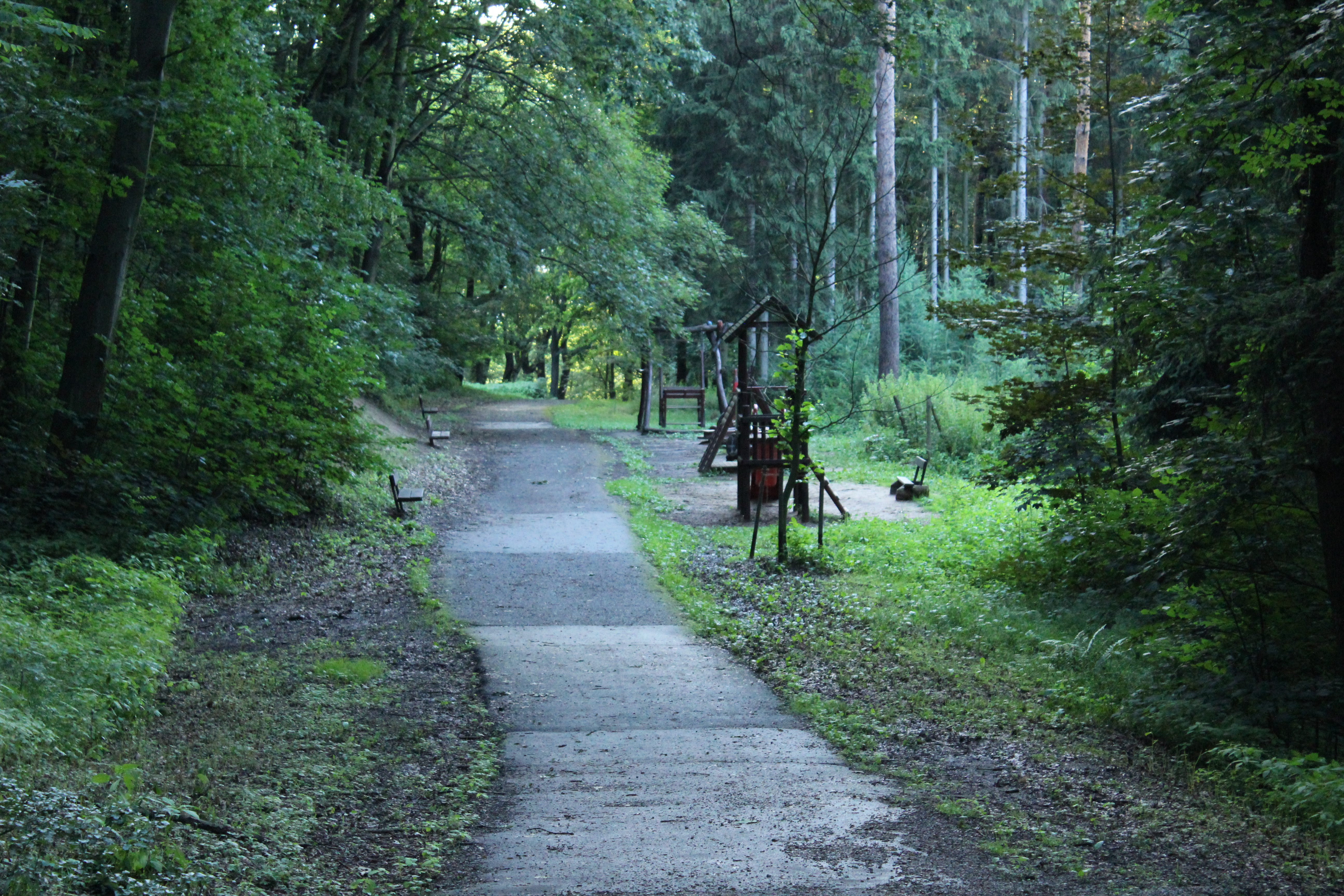 Cesta v pražském lesoparku Cibulka.